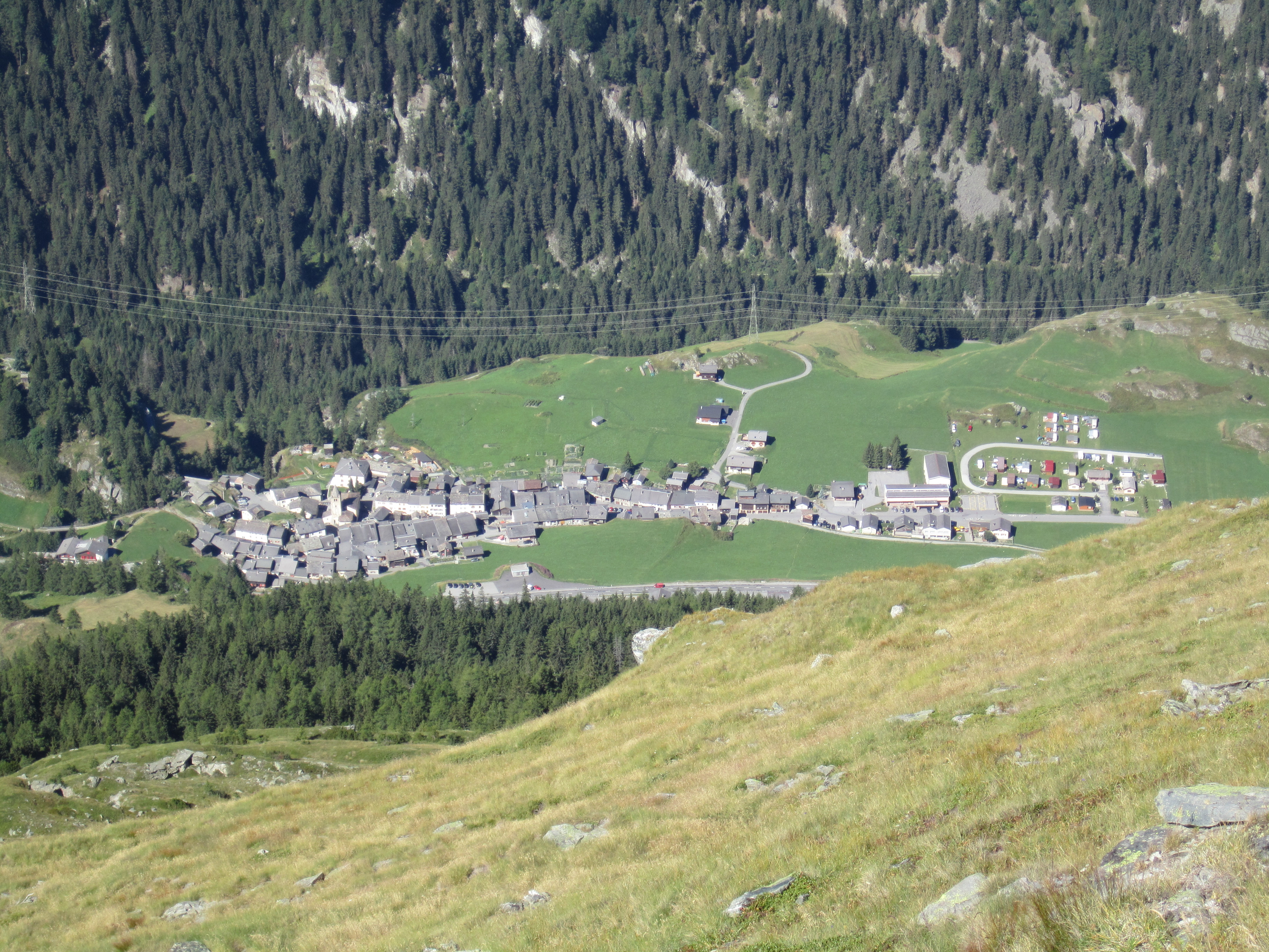 Bourg-Saint-Pierre van hoger